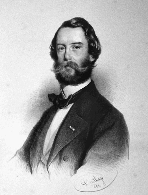 Karl Wilhelm von Tinti (1829 - 1884), Rakouský šlechtic a politik.